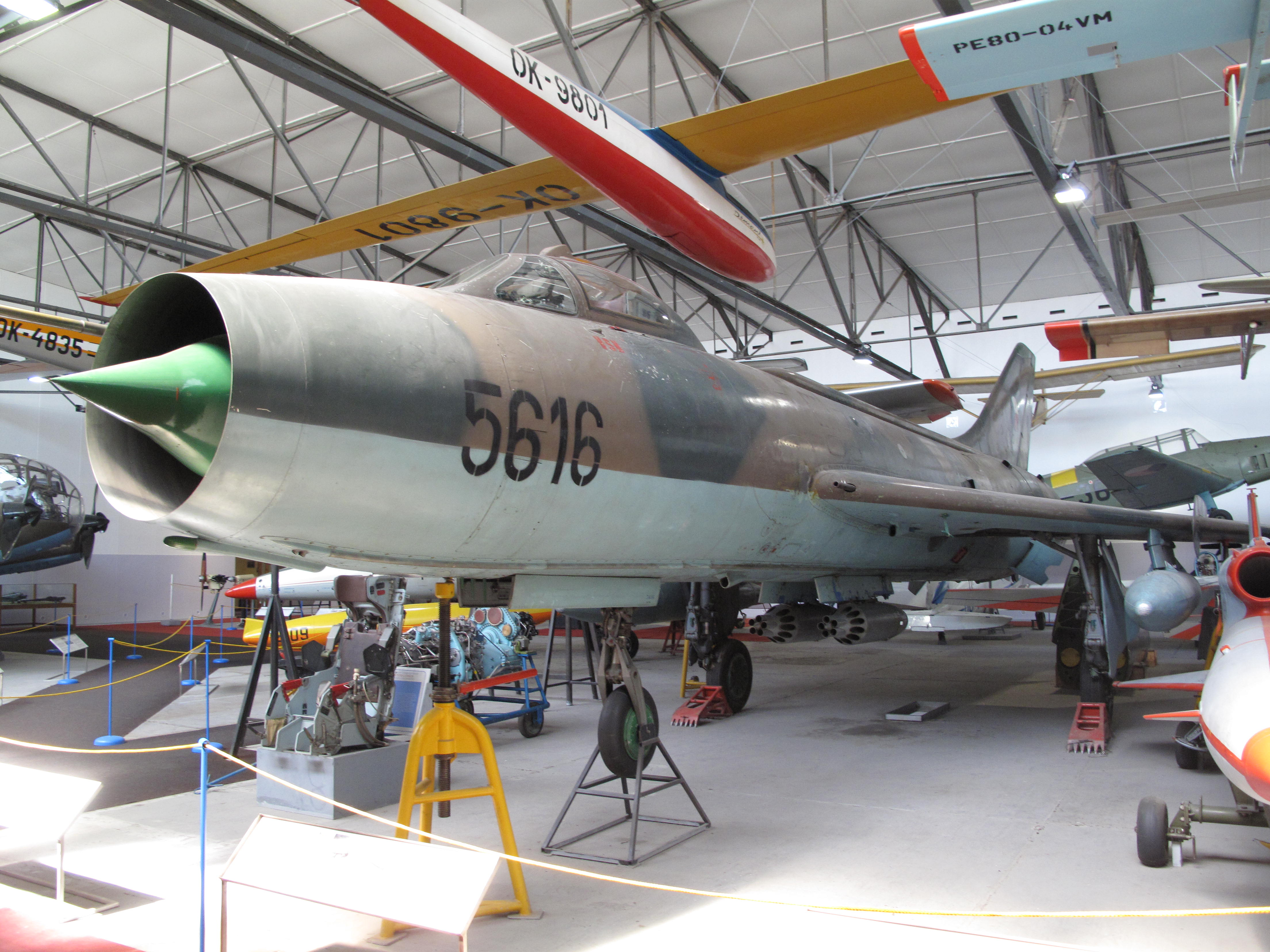 Sukhoi Su-7BM + kluzák VSM-40 (OK-9801); Letecké muzeum Kbely